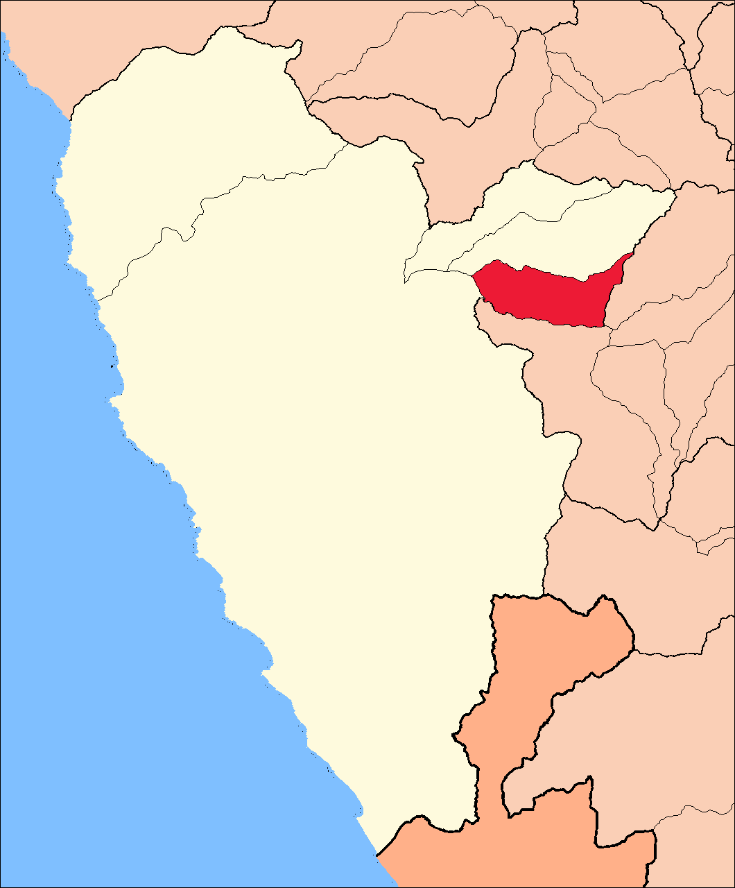 Ubicación del área del distrito de Cochapeti.